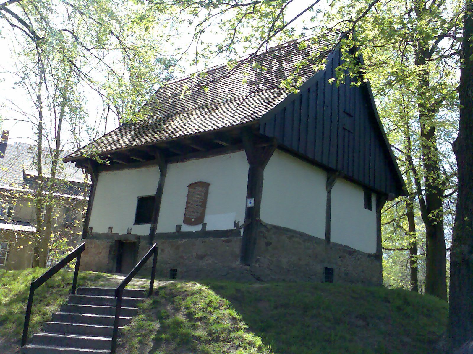 Denkmalgeschützte Wehranlage Perfert in Pulsnitz.